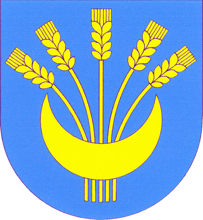 Znak obce Chodouny